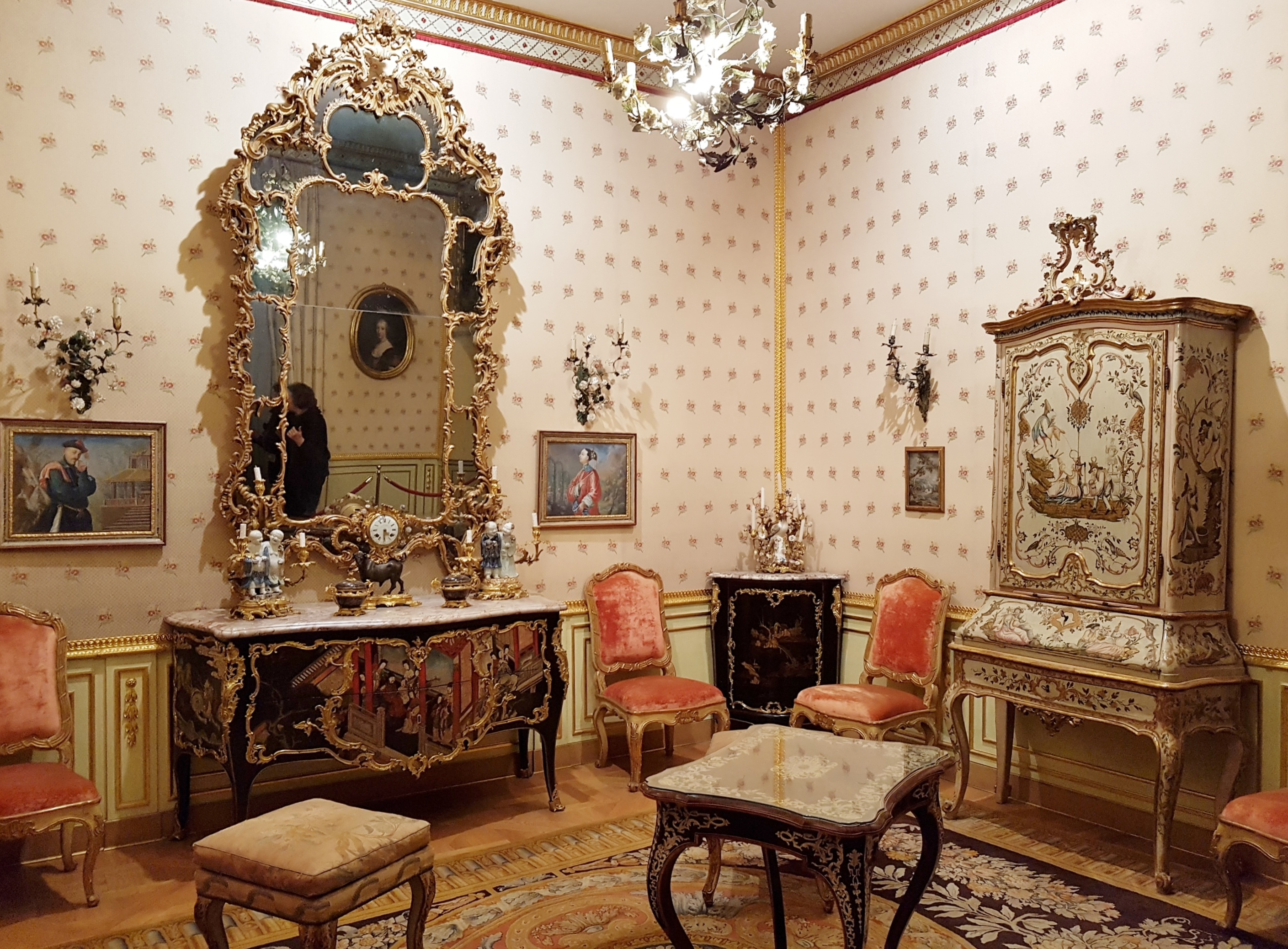 Salotto Luigi XV, Museo di Arti Decorative Accorsi–Ometto, Torino